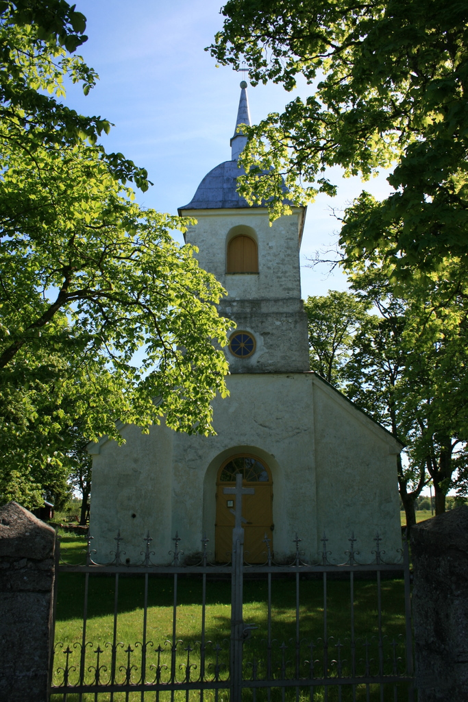 EAÕK Lümanda Issanda Muutmise kirik